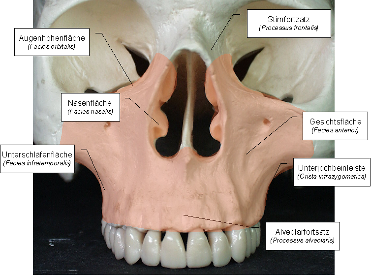 Abbildung des menschlichen Oberkiefers